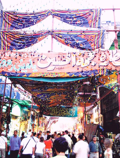 Khan El Kkalili Bazar